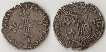 1/4 ecu de Enrique IV Francia